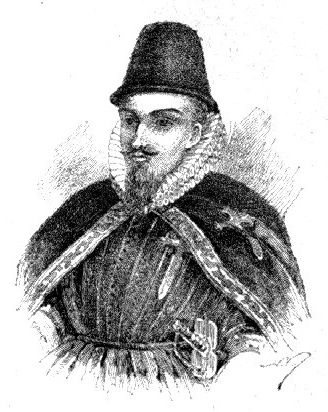 Diego López de Zúñiga, Spanish viceroy of Peru